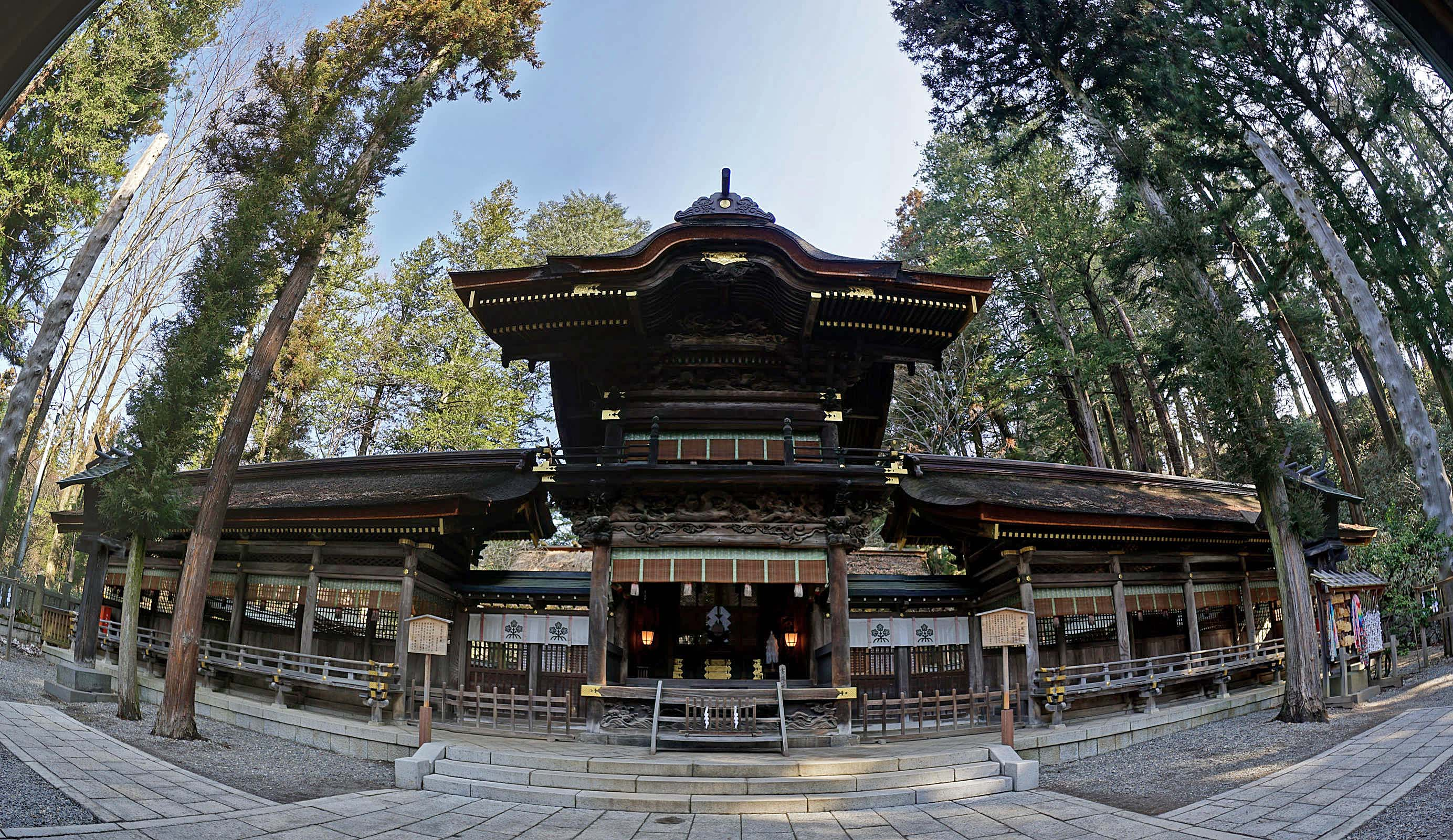 Suwa taisha Shimosha Harumiya , 諏訪大社 下社 春宮